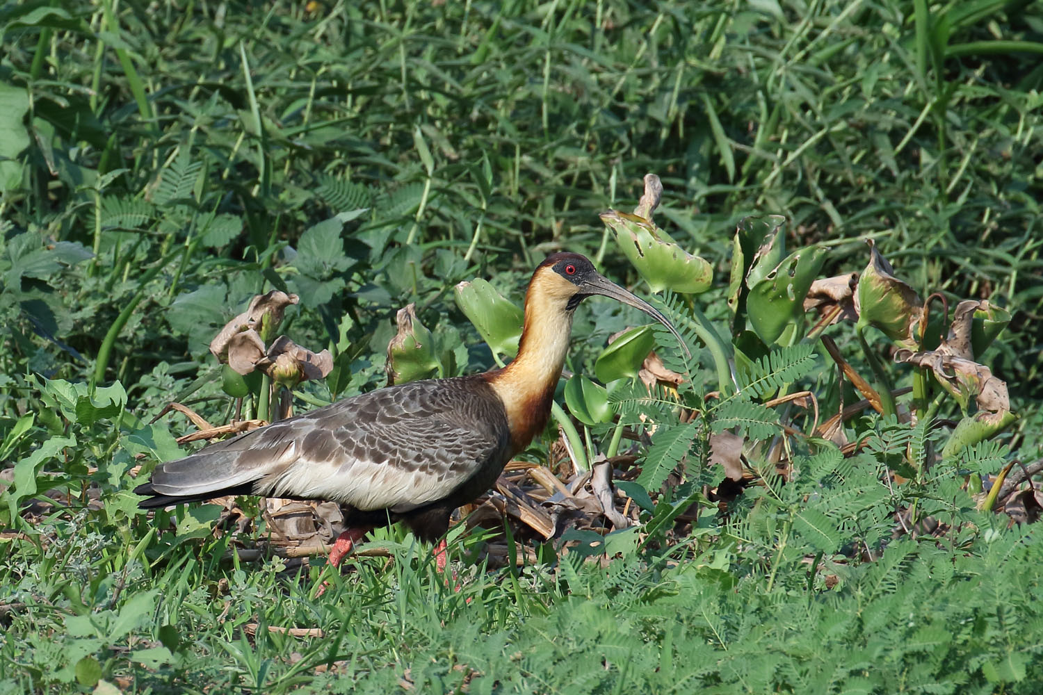 Ibis mandore, Pantanal (Brésil)